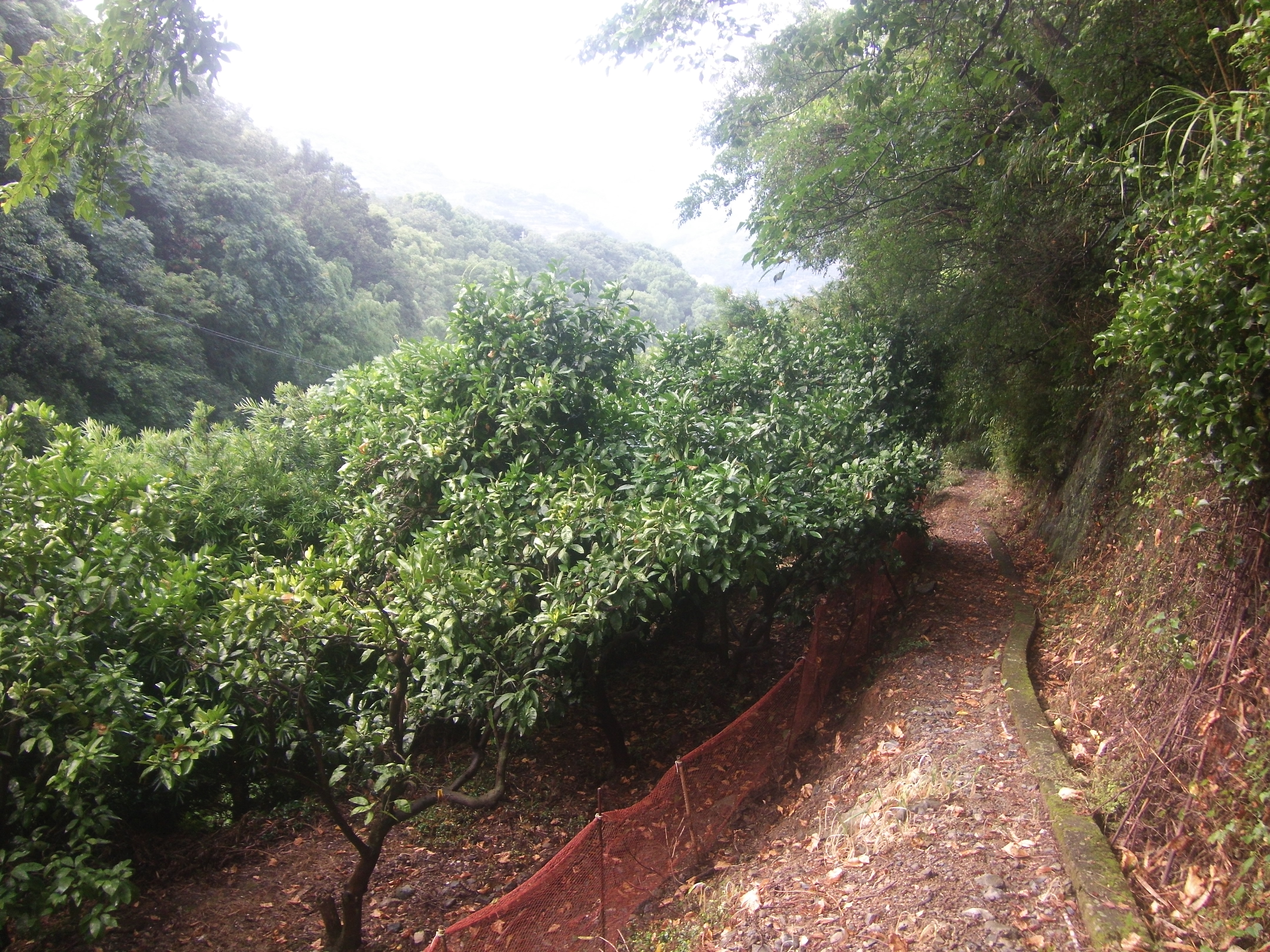 熊野古道・紀伊路の藤白峠を越え有田へ下る道は蜜柑畑の中を抜ける